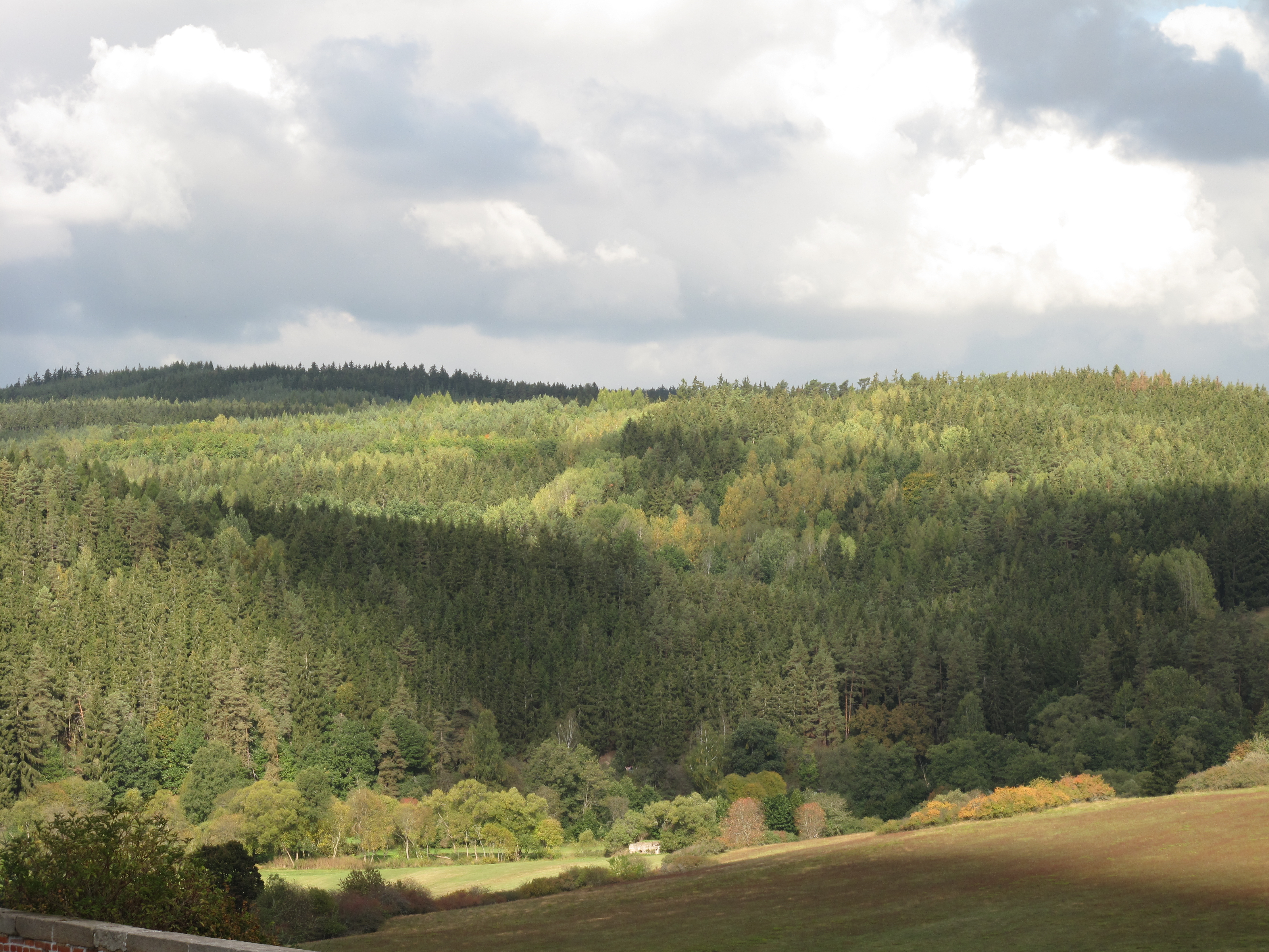 Lesy v okolí Rabštejna nad Střelou. Okres Plzeň-sever, Česká republika.